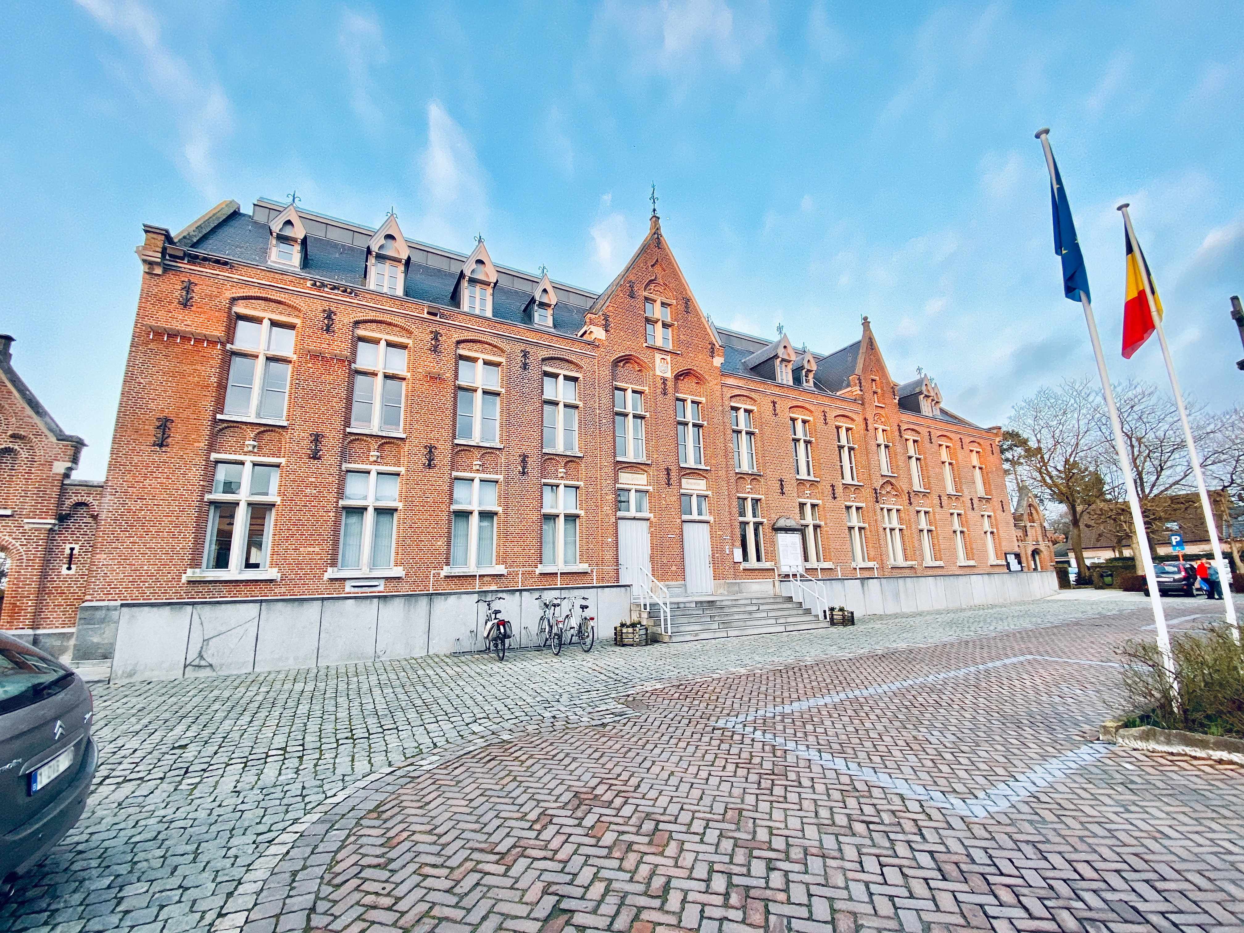 Gemeentehuis in Beernem. Foto gemaakt op 26 februari 2020.